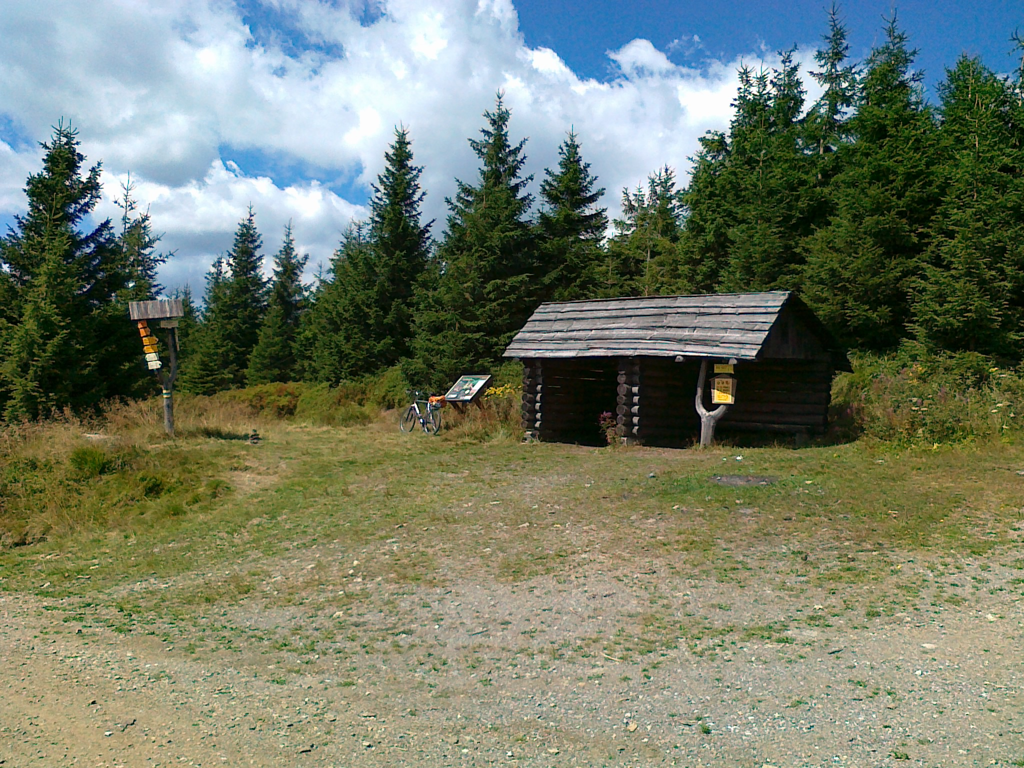 Skrzyżowanie szlaków o nazwie Kamzík